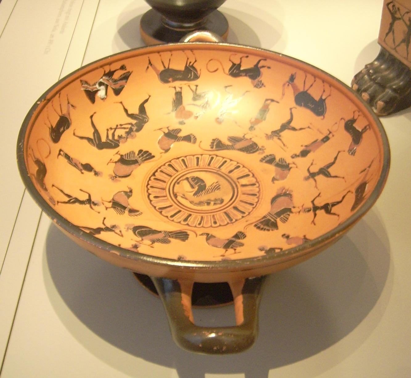 Sportszenen und Tierfriese, attisch-schwarzfigurige Schale (Kylix), signiert vom Töpfer Nikosthenes, bemalt vom Maler N, um 520 v. Chr., gefunden in Vulci, Antikensammlung Berlin/Altes Museum, Inventarnummer 1805